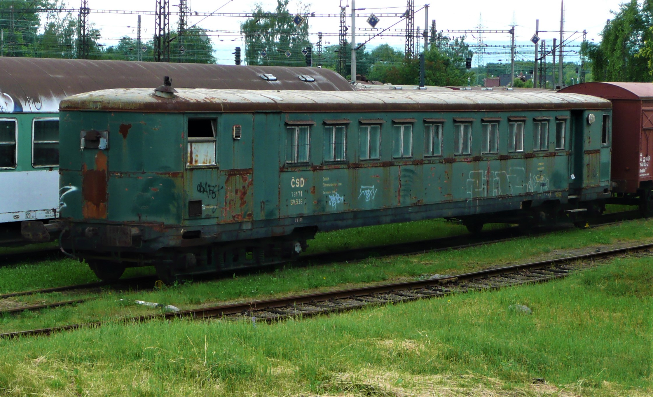 M 273 006 im NTM Depot Chomutov